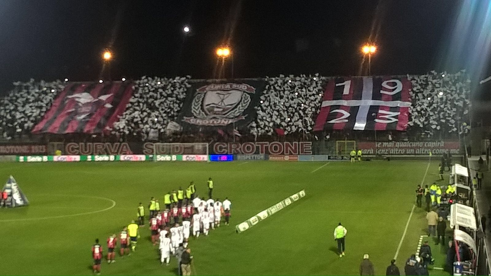 Coreografia Curva Sud - Crotone - Cagliari: 3-1